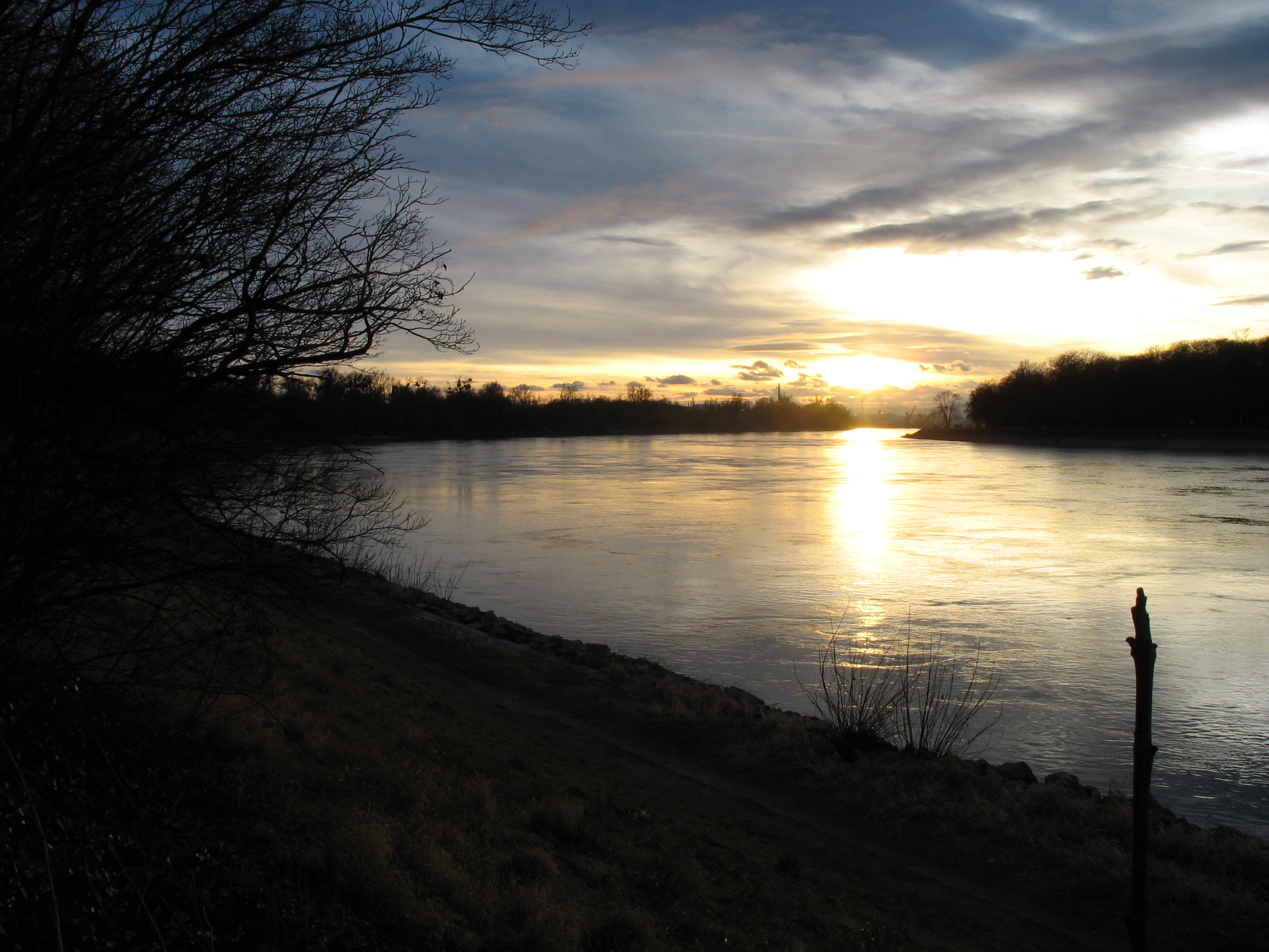 Sonnenuntergang am Rhein im Winter, fotografiert in Mannheim.